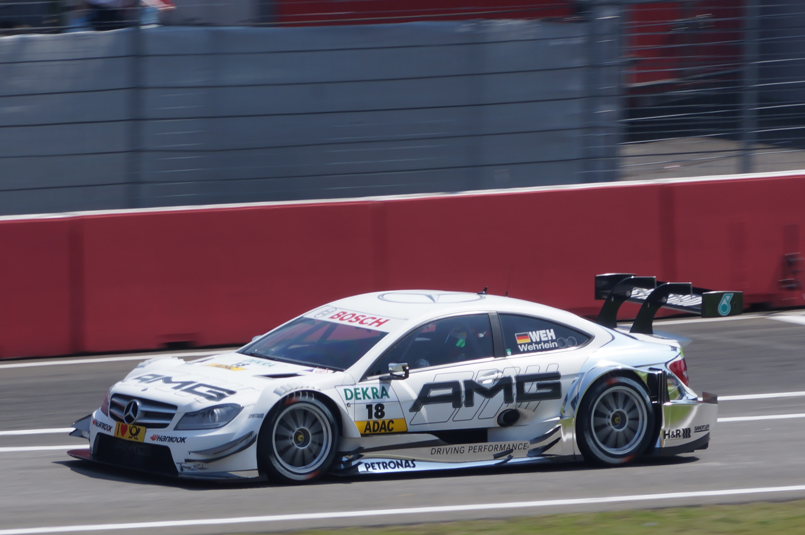 DSC01142_DxO